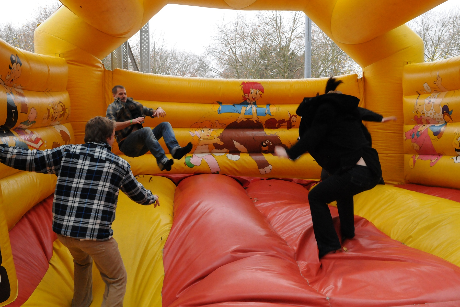 Hüpfburg auf dem Bundesparteitag der Priatenpartei Deutschland am 24. November 2012 in Bochum